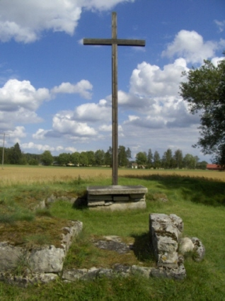 Kullkyrkan. en ruin av en gårdskyrka från 1100-talet i Mosjö församling söder om Örebro